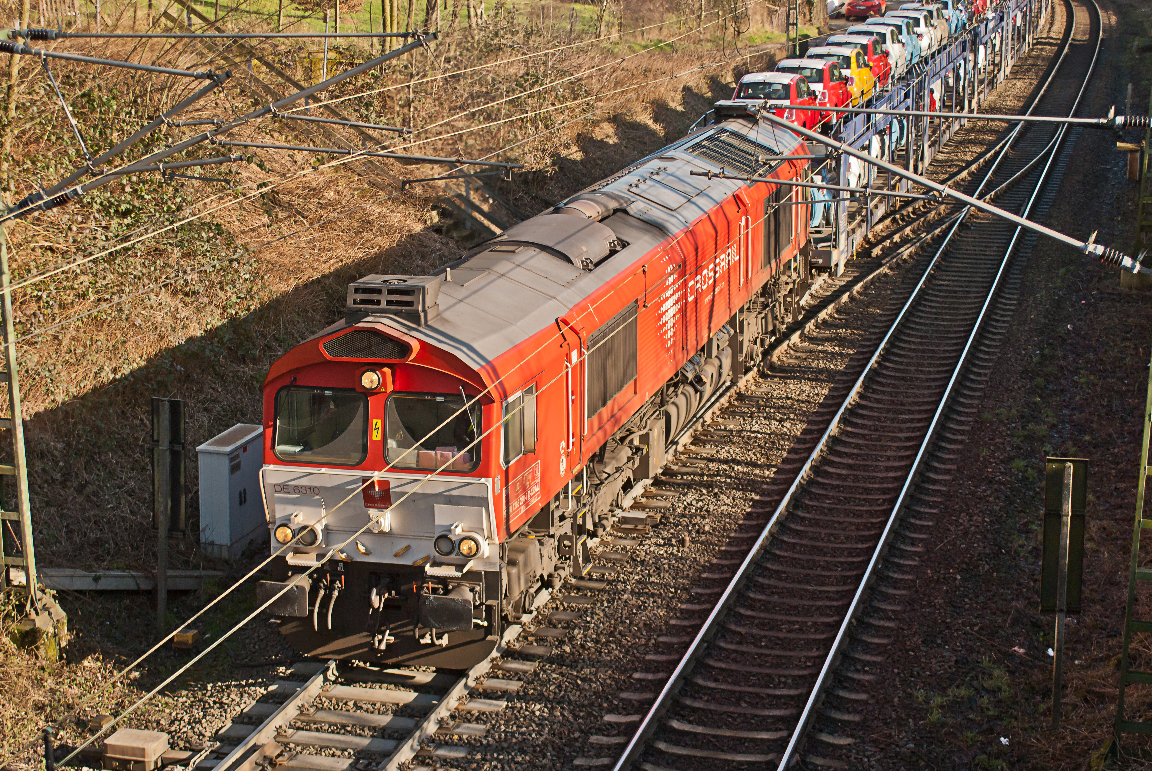 EMD Class 66 der Crossrail. Aufgenommen von der Überführung des Geusenweges in Aachen über die Montzenroute